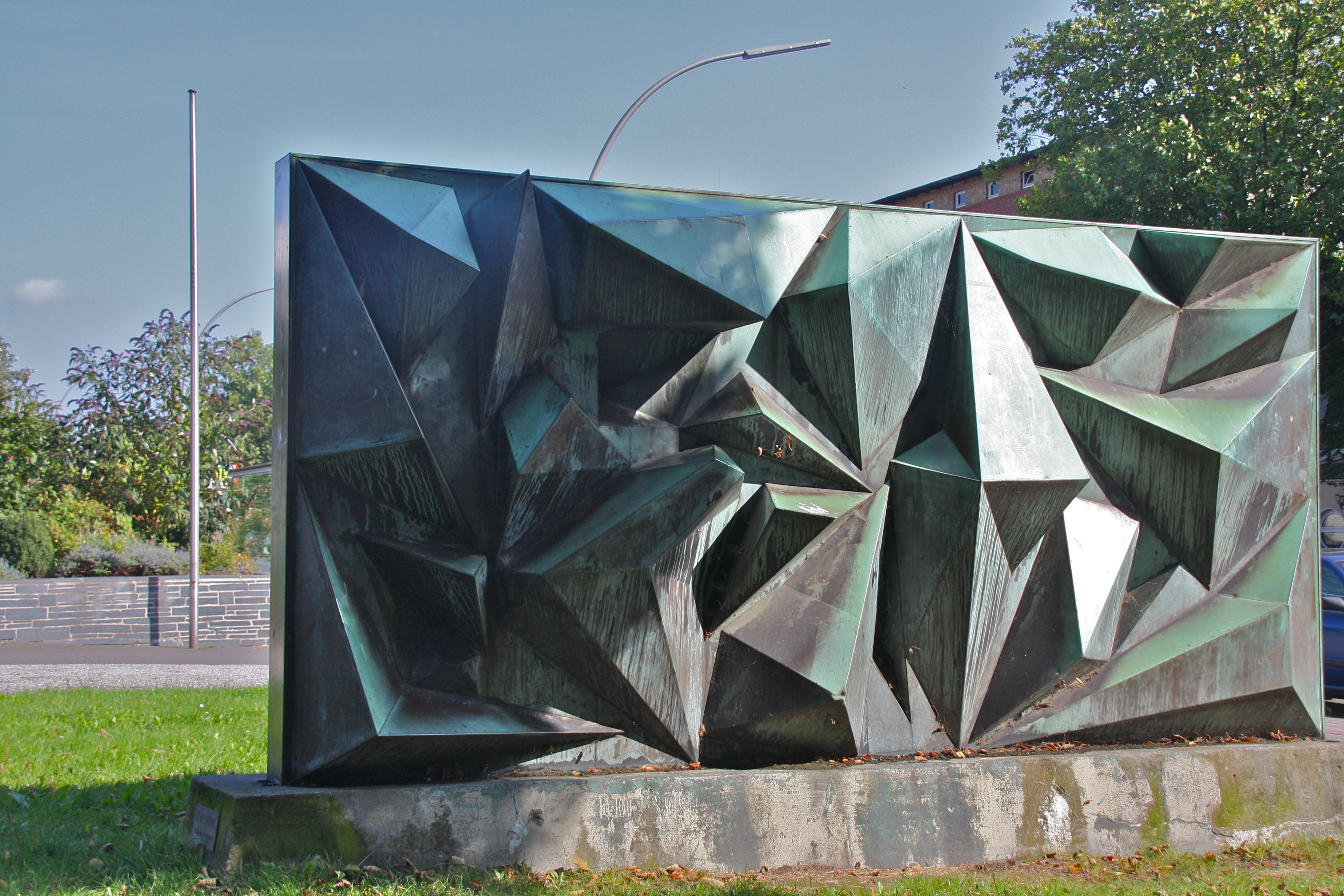 Hamburg, Eimsbüttel, Veranstaltungszentrum Hamburg-Haus, Aussenbereich, freistehende Skulptur von Hildegard Stromberger: "Die Erhebung" (1966–67).